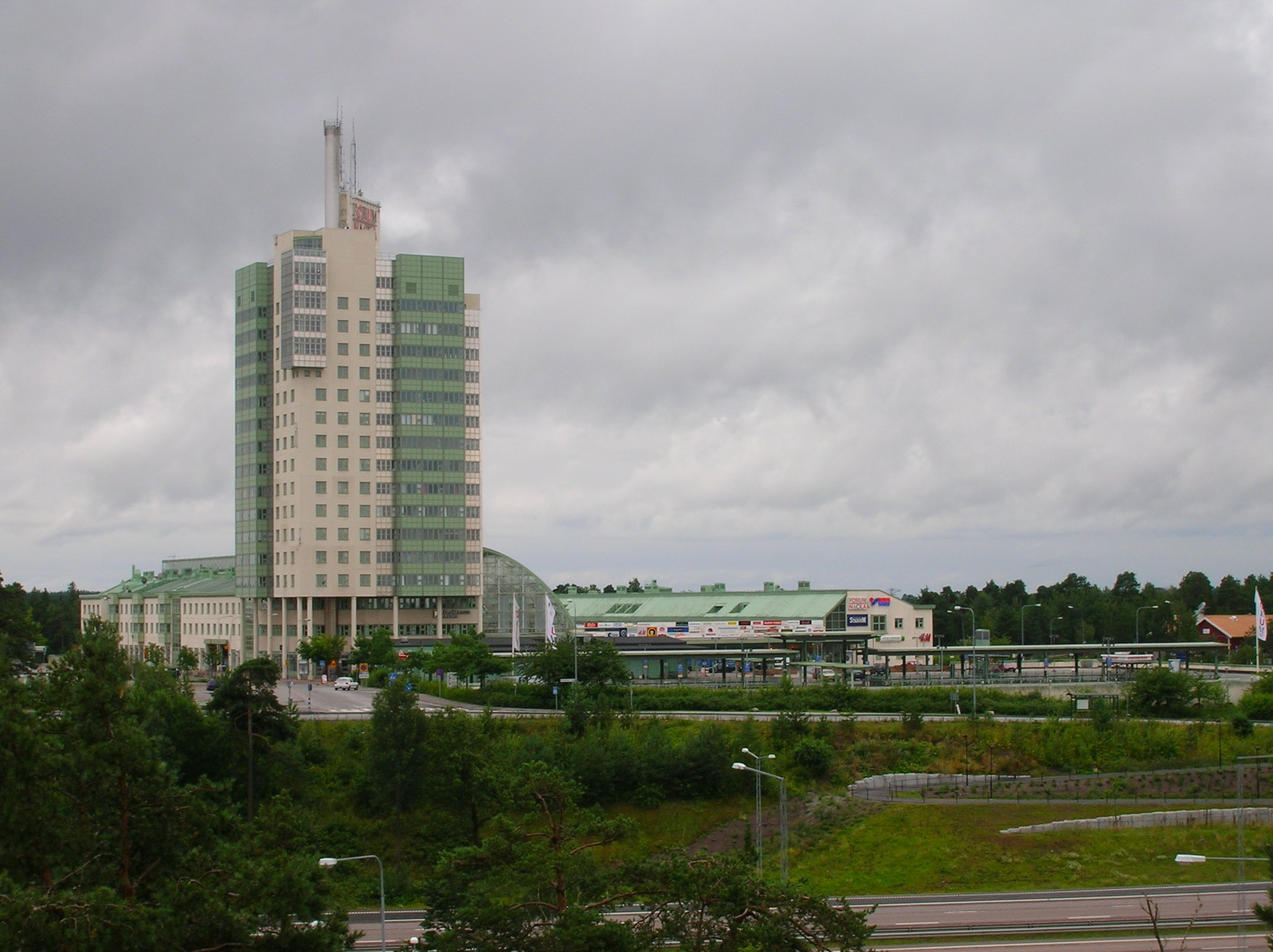 Forum Nacka, Skvaltan, Nacka, Sverige